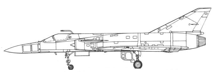 IAI Nammer (Kfir derivate) design